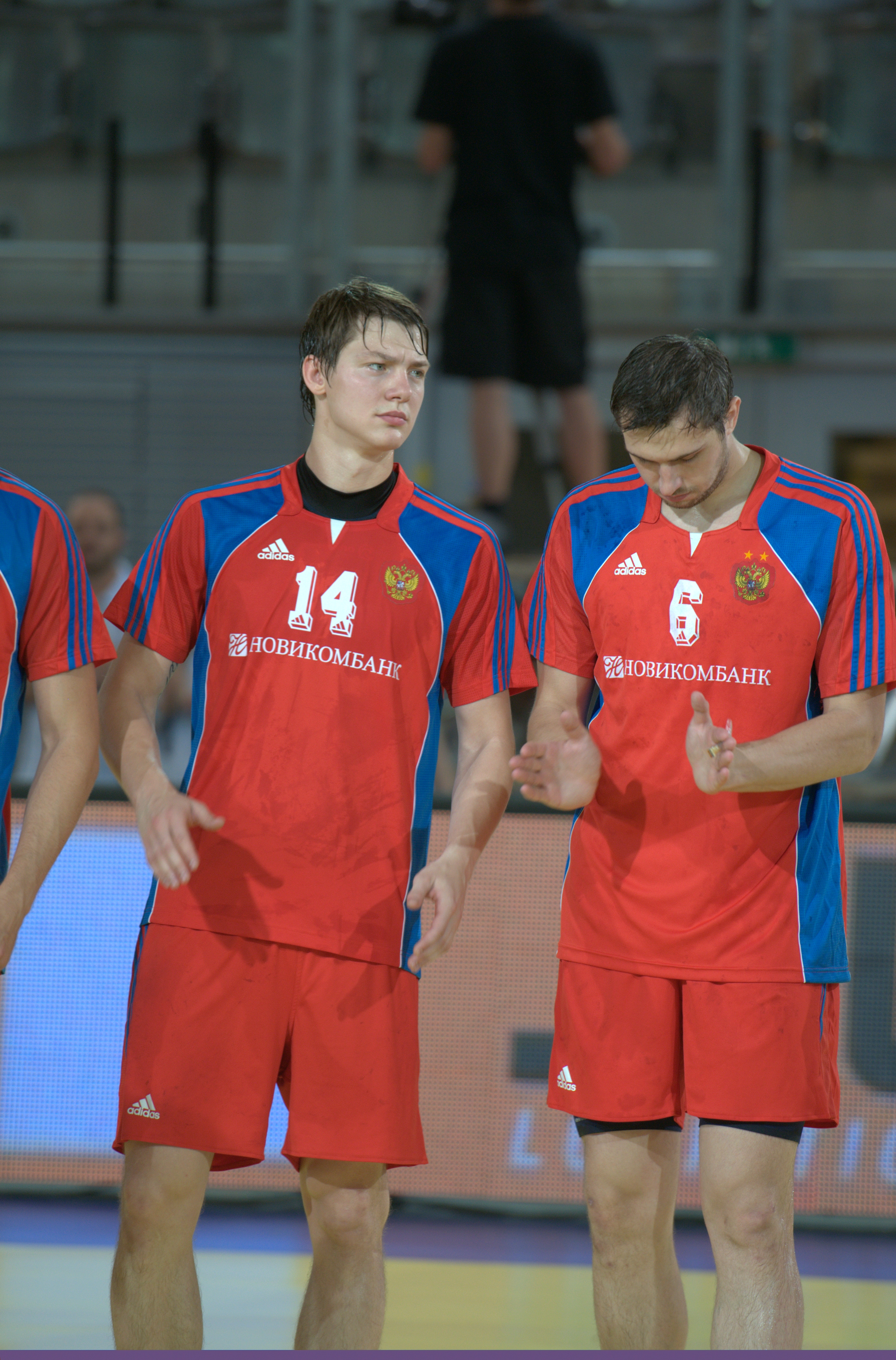 Handball EM Qualifikationspiel Österreich vs. RusslandZhintnikov u. Pyshkin